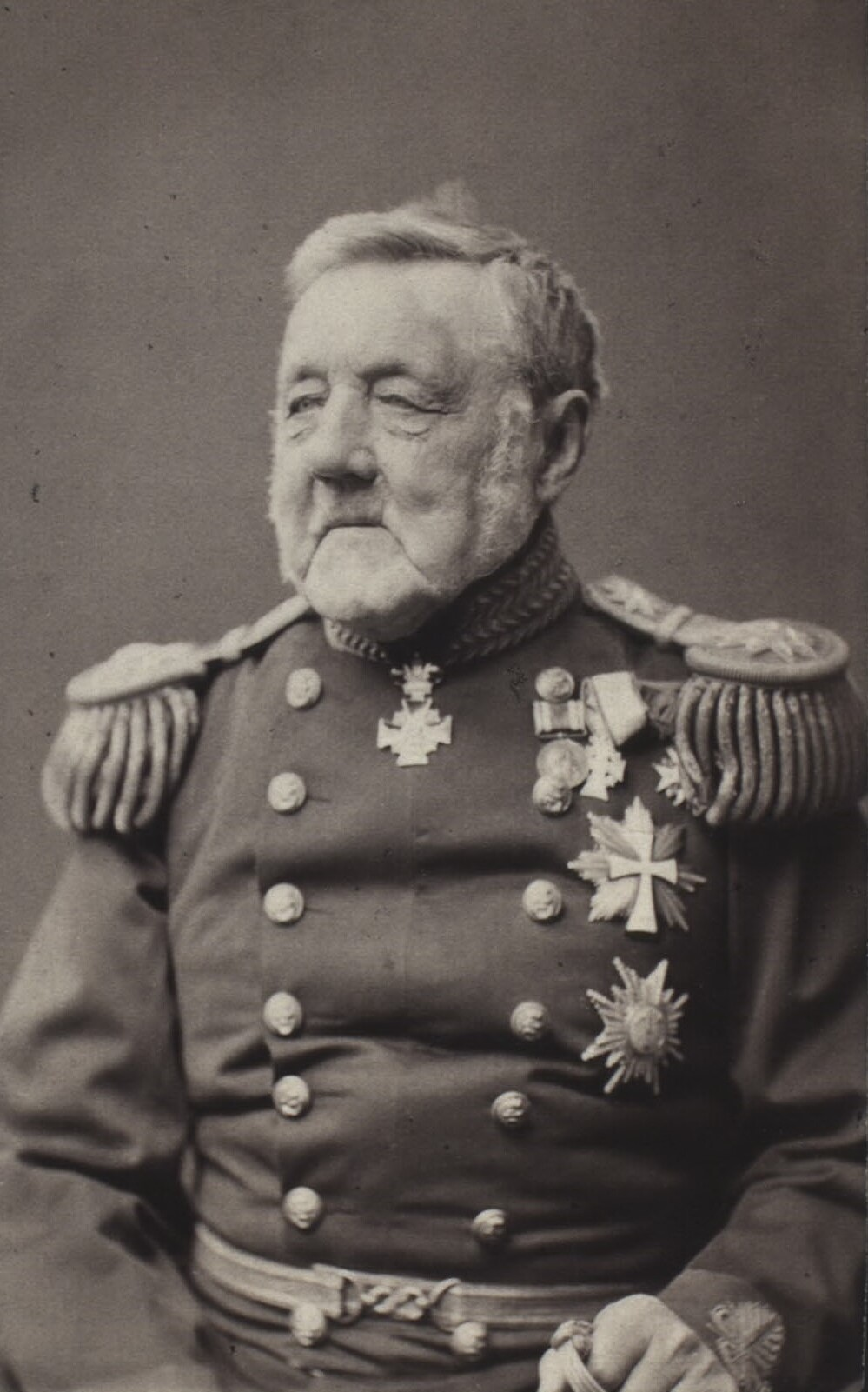 Steen Andersen Bille jun. (5.12.1797-2.5.1883) søofficer